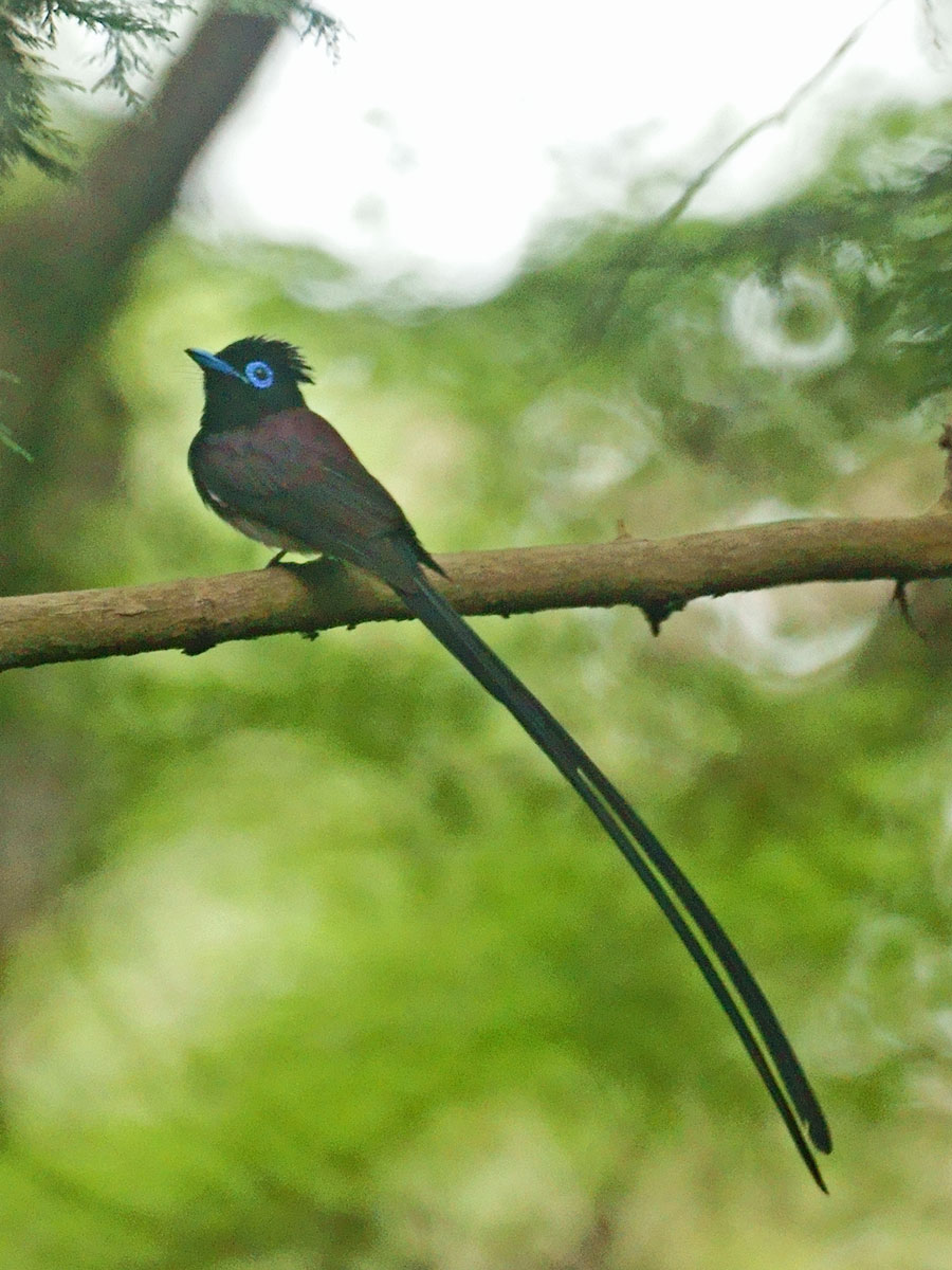 サンコウチョウ♂成鳥（京都市左京区）